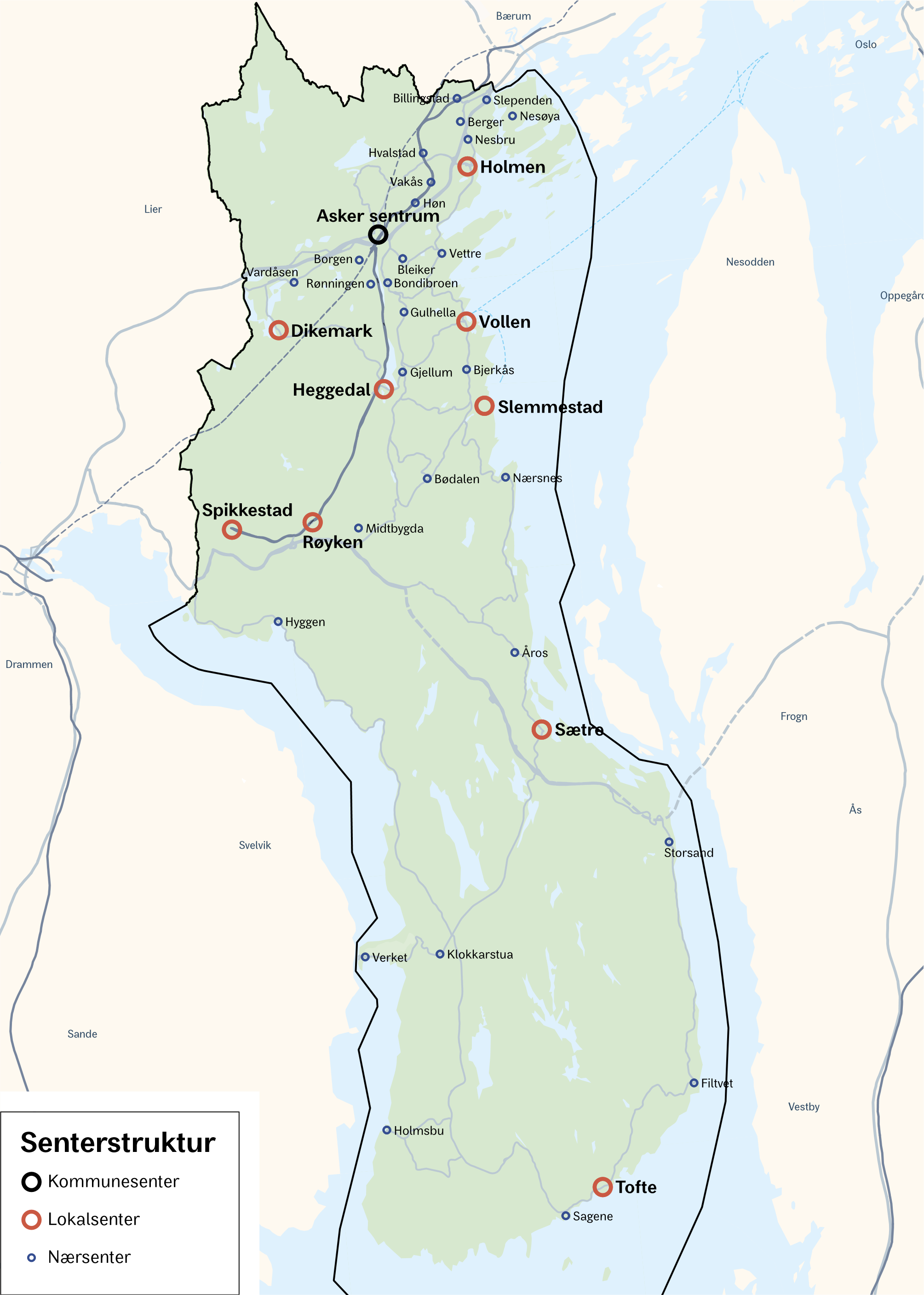 Kart som viser senterstruktur i Asker kommune.